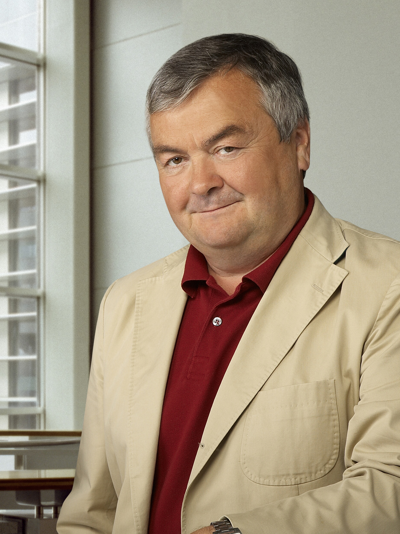 Portrait Dr. Johann Kalliauer